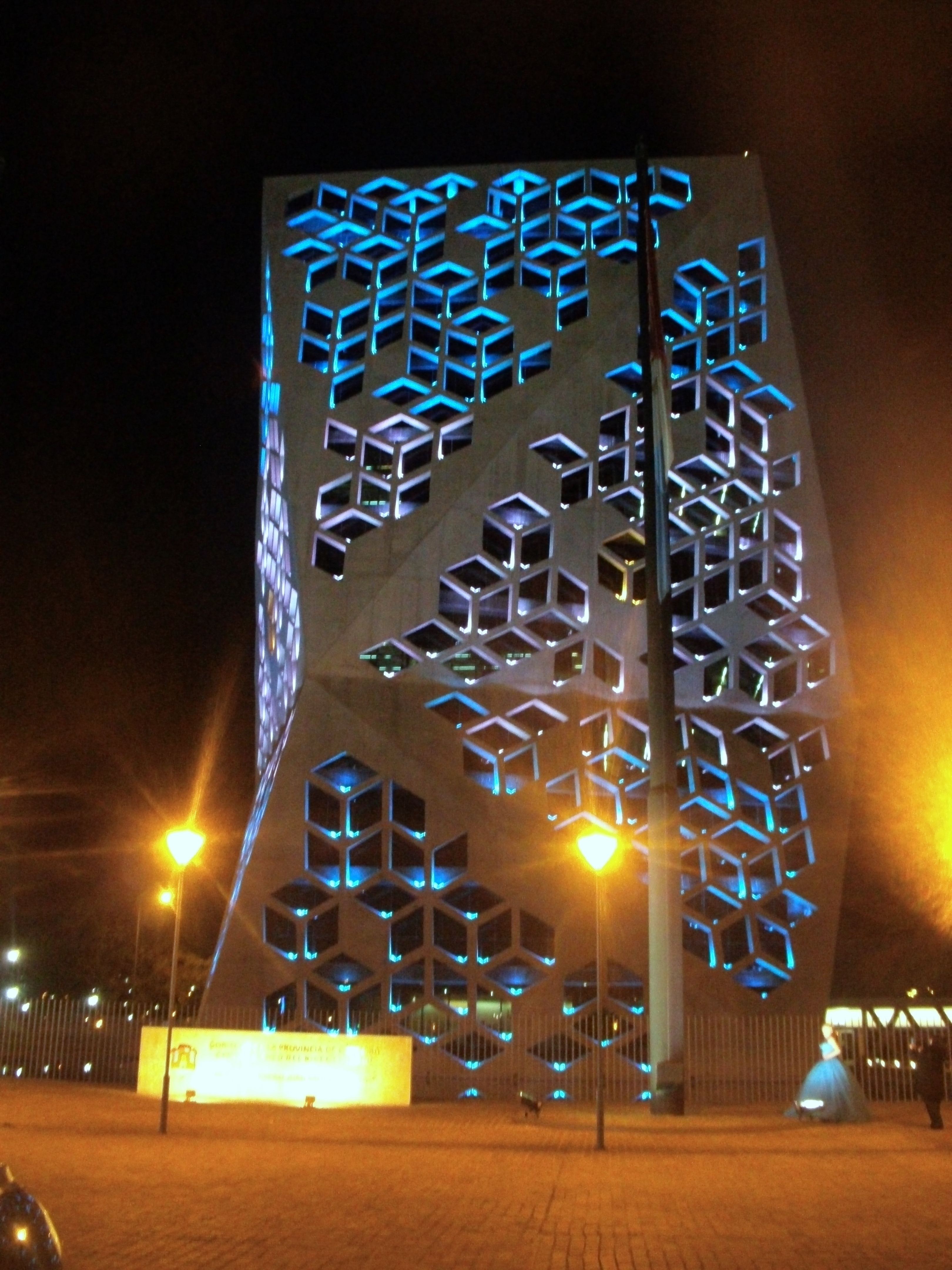 El flamante centro cívico dedicado al bicentenario.